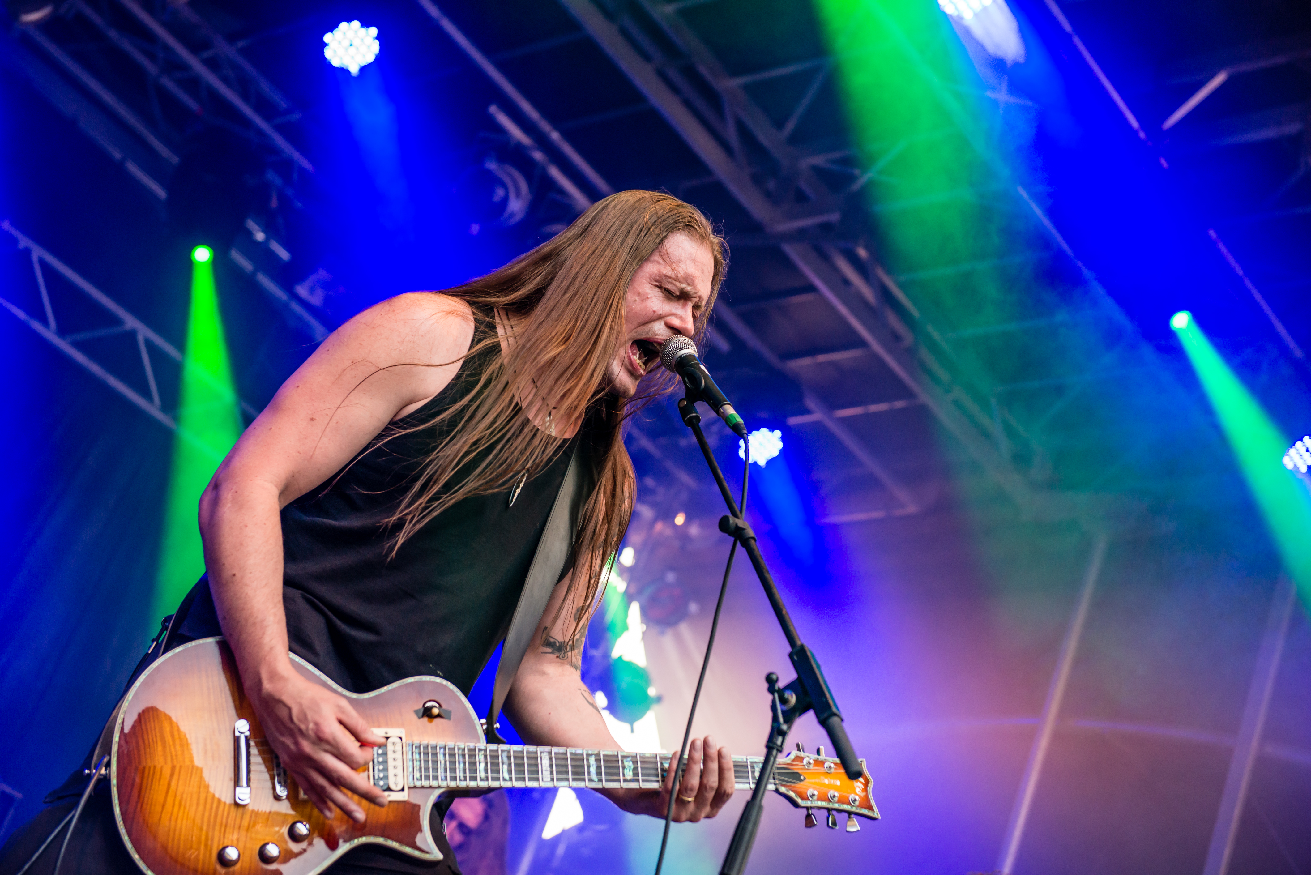 'Castle Rock 2015; Mülheim Schloß Broich': 'Poisonblack'